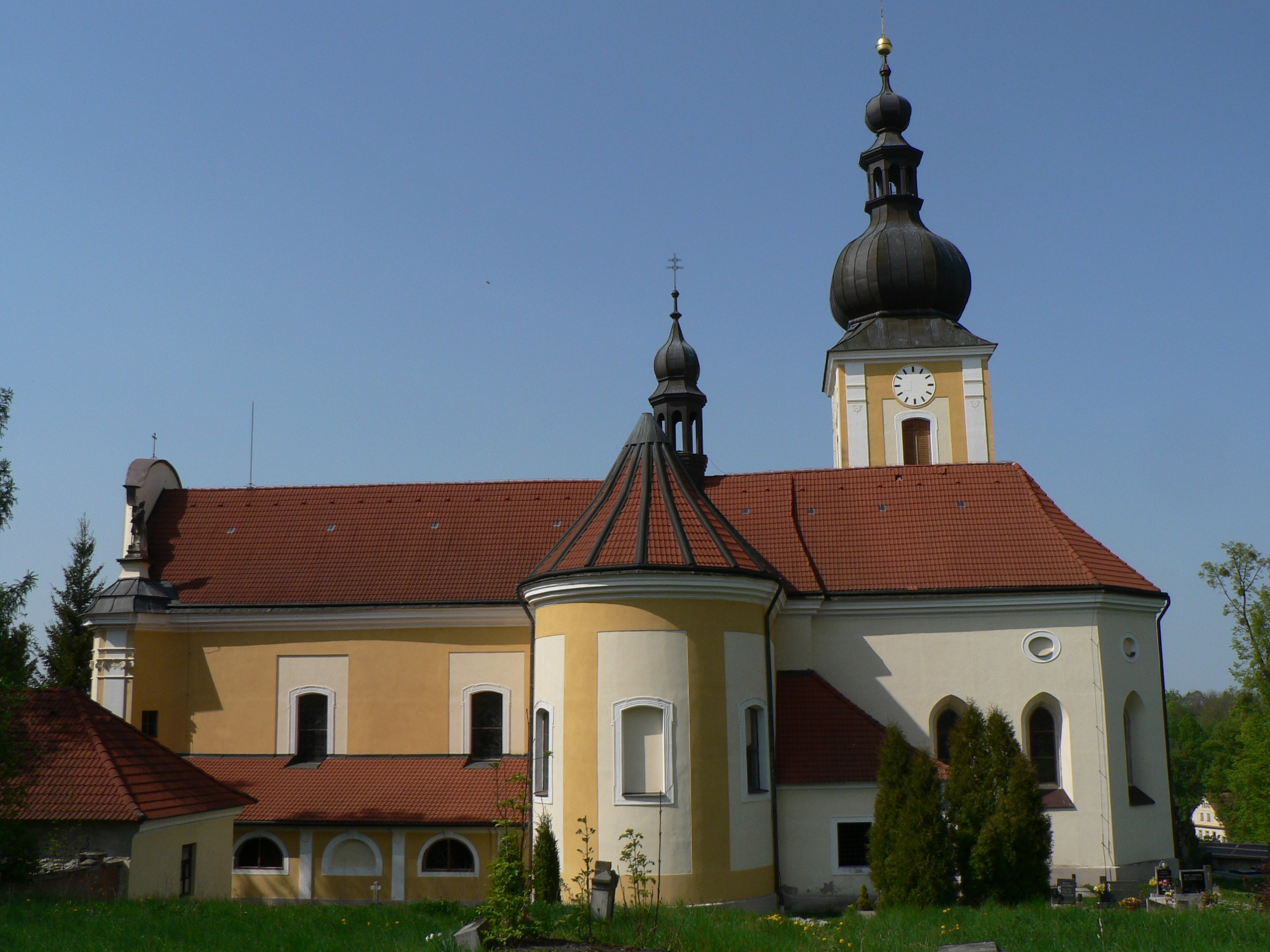 Kostel svatého Mikuláše (Čistá)